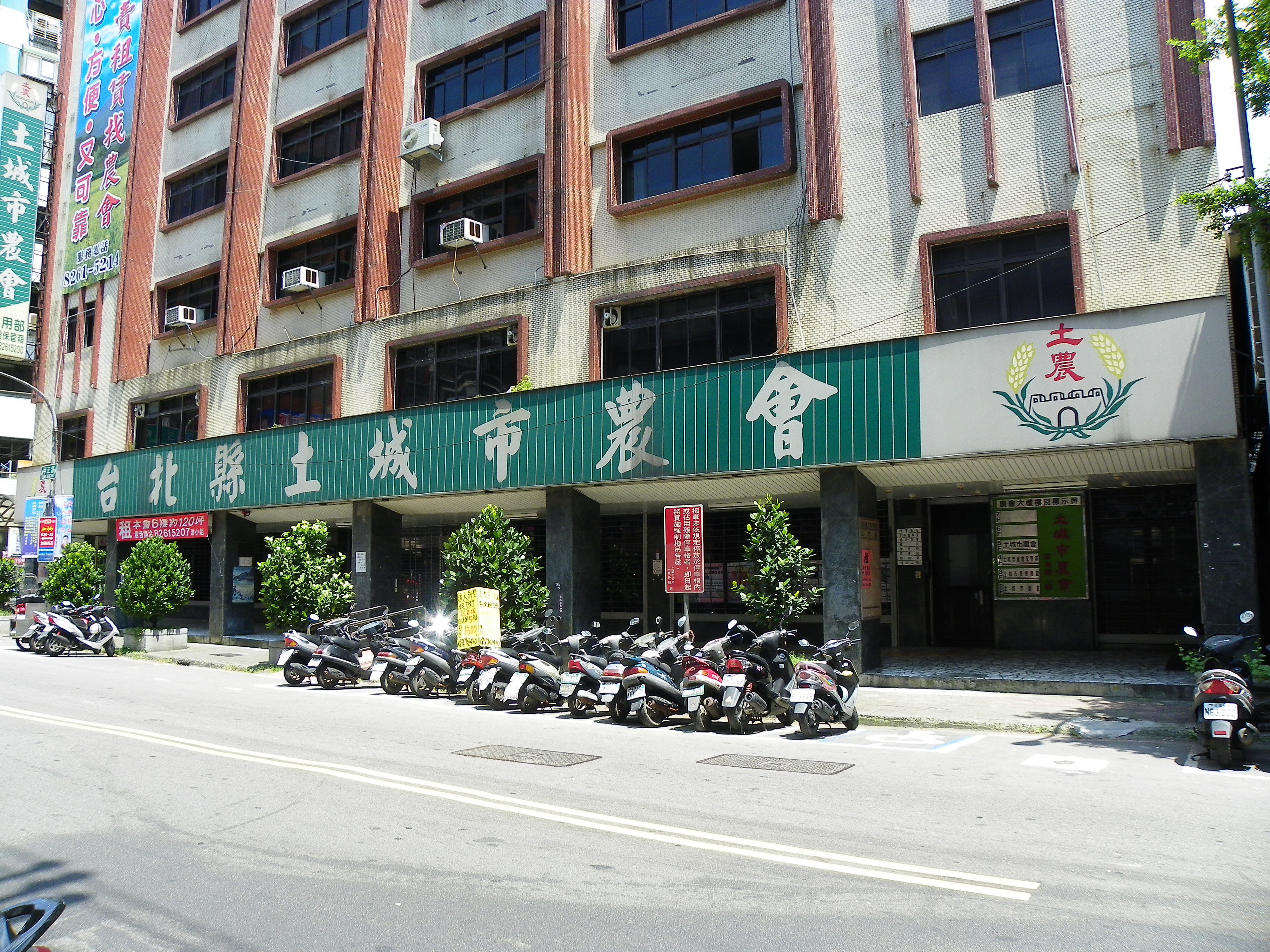 臺北縣土城市（今新北市土城區）農會，地址：新北市土城區中正路5號。